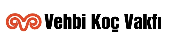 Vehbi Koç Vakfının logosudur.